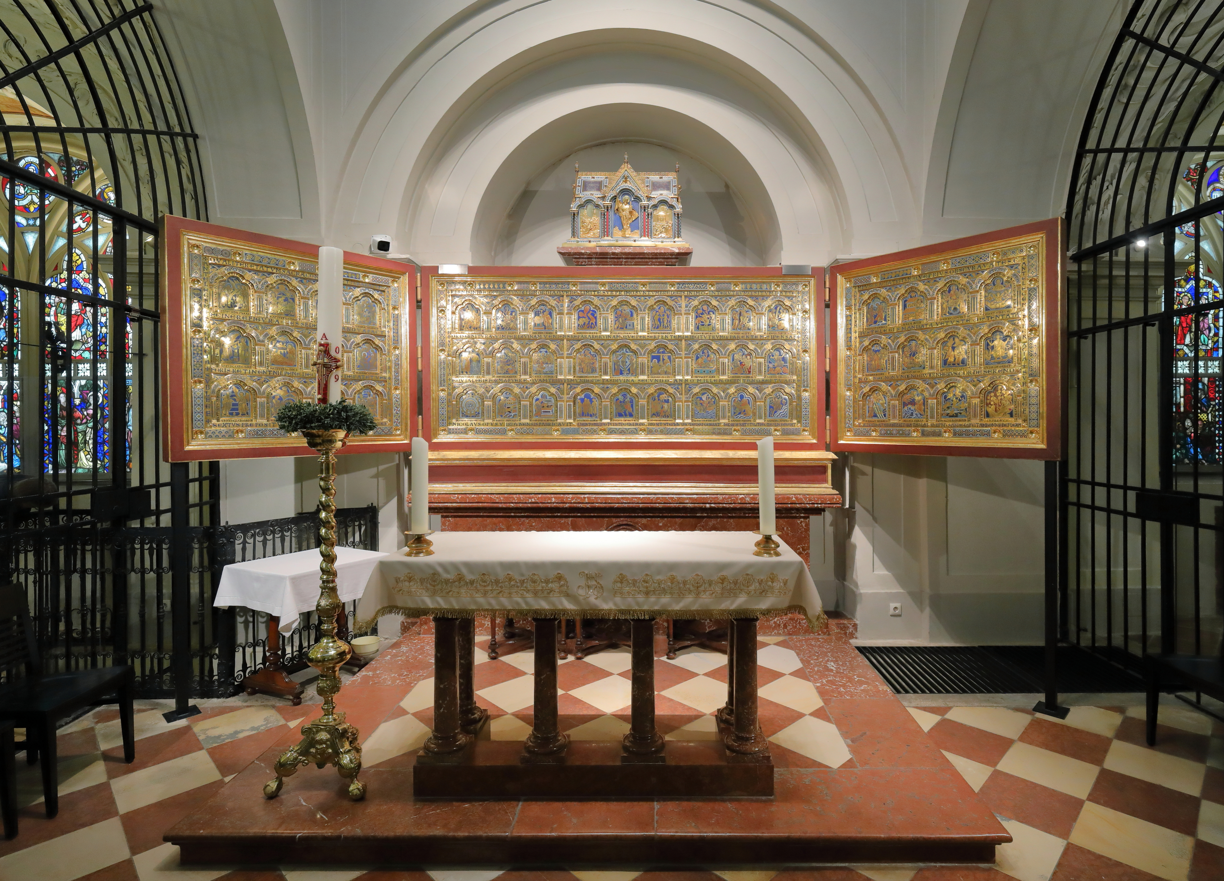 Der Verduner Altar in der Leopoldskapelle des Augustiner-Chorherrenstiftes in der niederösterreichischen Stadt Klosterneuburg.Das Kunstwerk mit insgesamt 45 Emailtafeln wurde von dem Künstler Nikolaus von Verdun im Jahre 1181 nach ungefähr zehnjähriger Arbeit fertiggestellt und war ursprünglich ein Schmuckwerk der Kanzelbrüstung in der Stiftskirche. Nach einem Brand im Jahre 1330 wurden die 45 Tafeln und 6 neu gefertigte Tafeln zu einem Flügelaltar zusammengefügt.